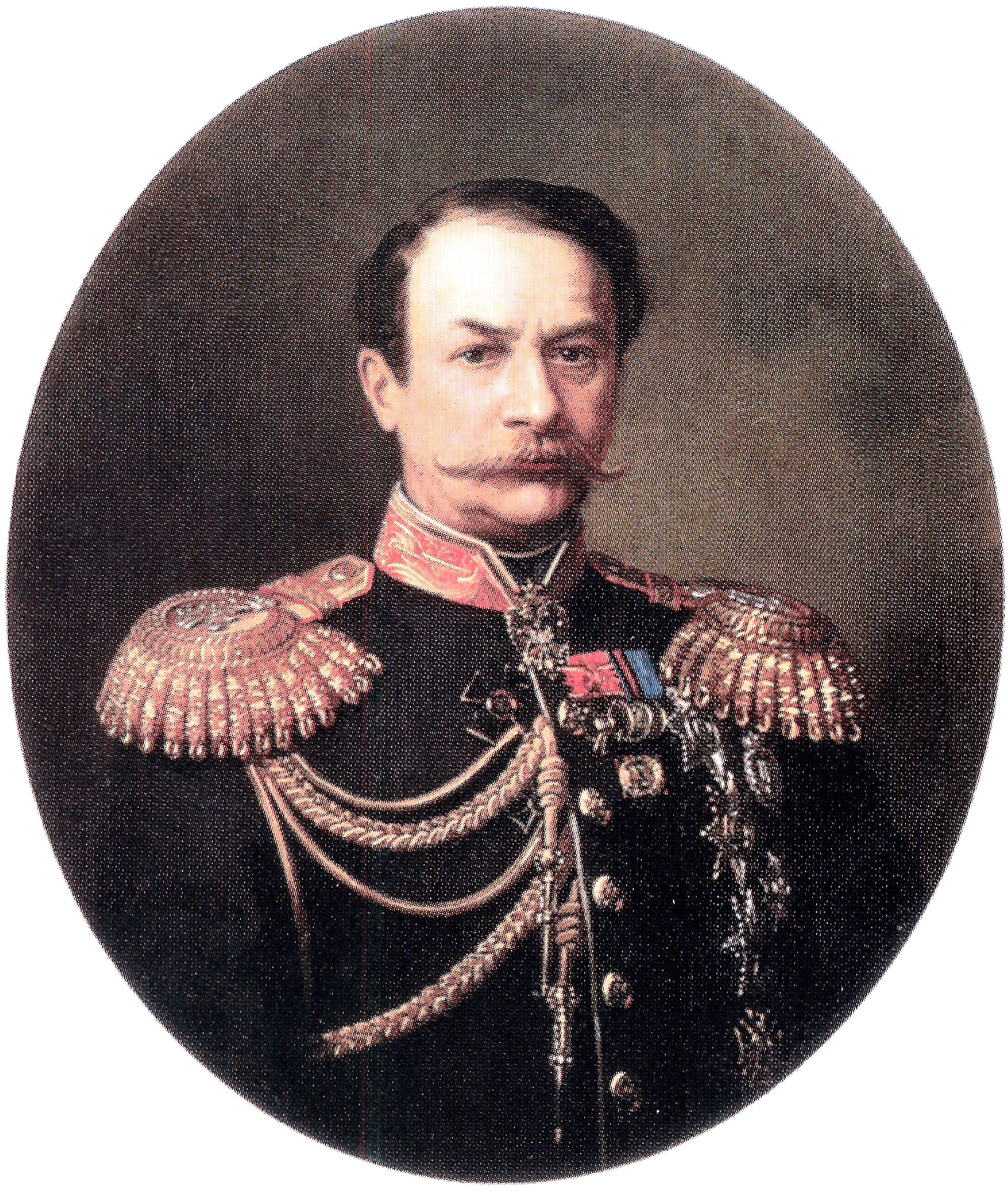 Портрет генерал-адьютанта А. Е. Тимашева (1818-1893). Художник Иван Алексеевич Тюрин. 1873 г. Государственный музей истории Санкт-Петербурга